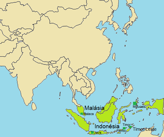 Português do Brasil: Localização dos crioulos malaio-portugueses